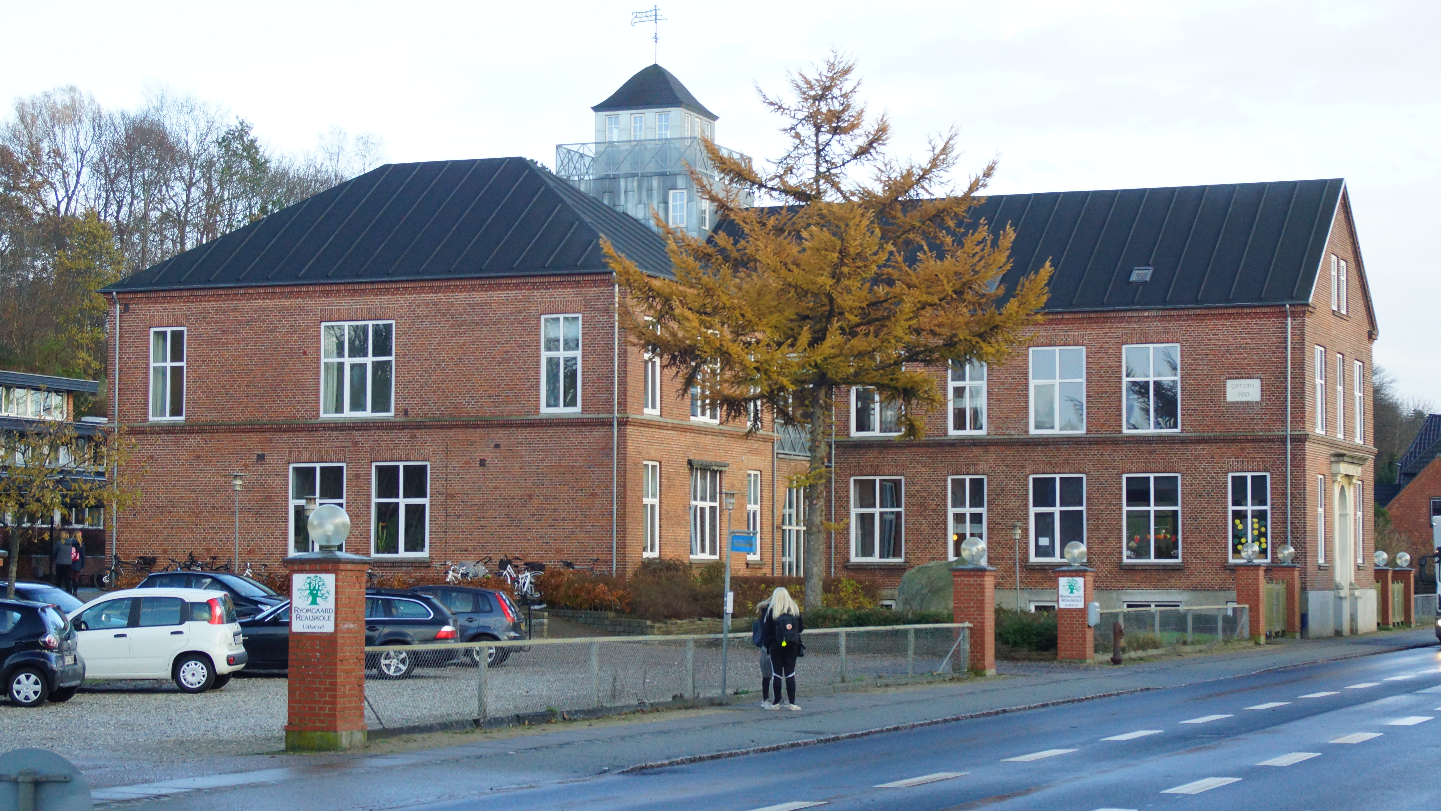 Ryomgård Realskole